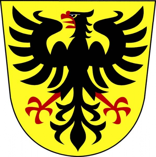 znak, Hostěradice, okres Znojmo